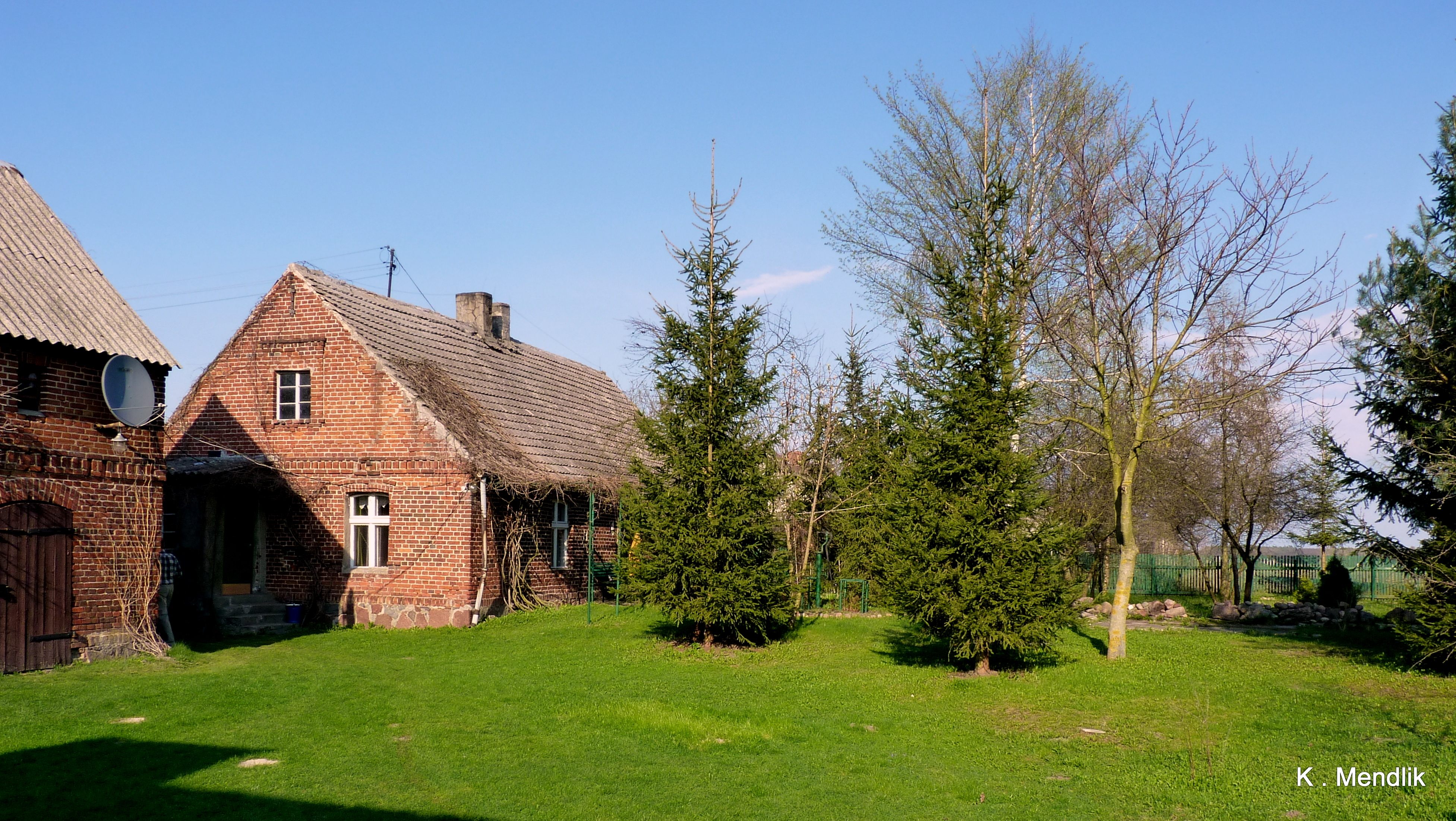 Szczepanowo - Wierzbowa 2